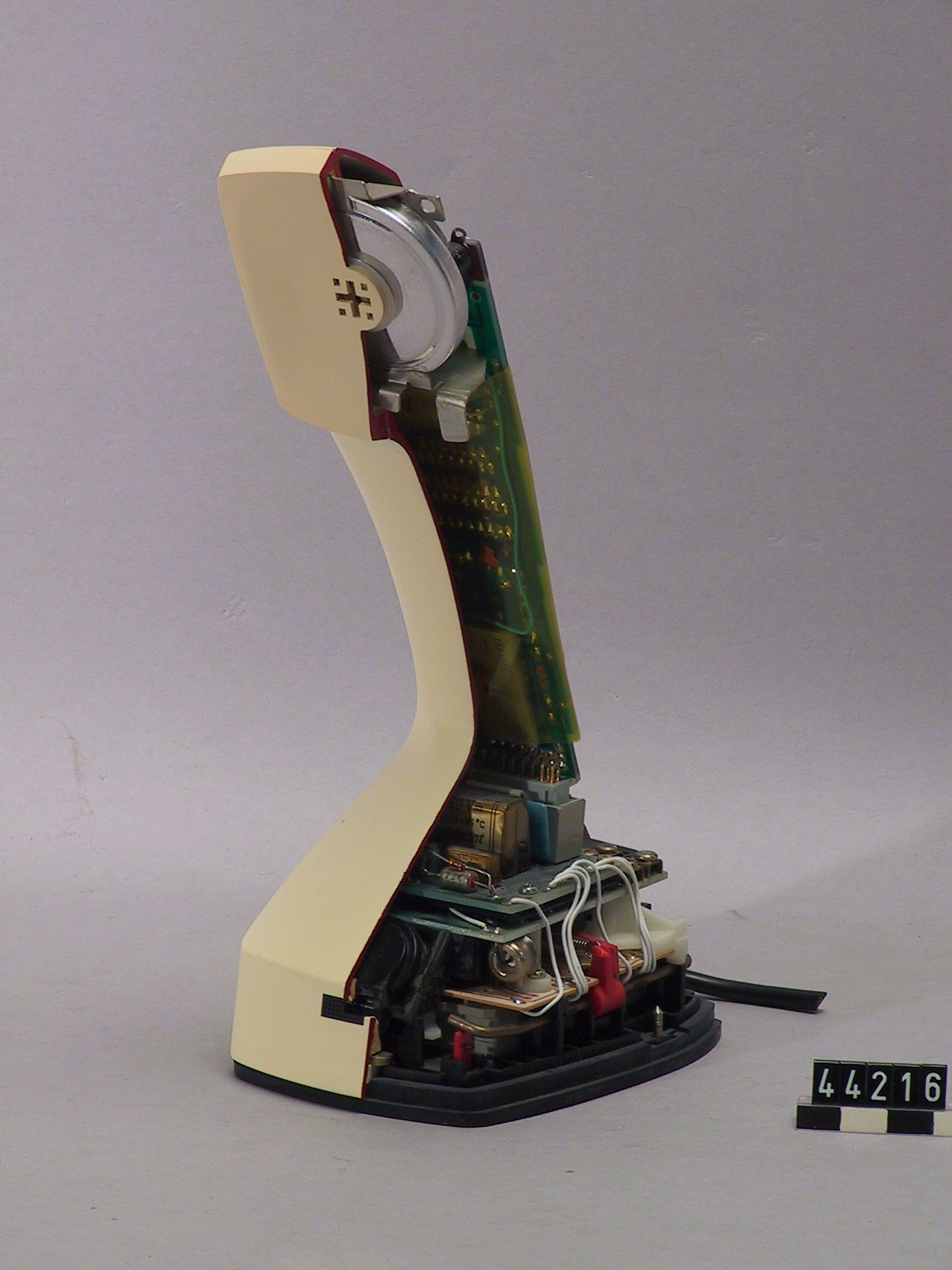 Knappsatstelefon Ericofon 700, moderniserad uppföljare till den beryktade Ericofonen från 1950-talet. Genomskuren för demonstrationsändamål. Ericofon 700 introducerades 1976 i samband med LM Ericssons 100-årsdag som den första helt elektroniska enstycksapparaten. Den var också Ericssons första telefon som kunde konstrueras enbart för knappval. Teknikutvecklingen hade gjort det möjligt att omvandla en knapptryckningskod till dekadisk impulsering och apparaten kunde därmed användas oberoende av vilken typ av lokalstation den var ansluten till. I Ericofon 700 utnyttjades i stor utsträckning moderna elektronikkomponenter med bl.a. integrerade kretsar, elektronisk talkrets och elektretmikrofon. Detta bidrog till telefonens goda transmissionsegenskaper, låga vikt och kompakta byggsätt. Formgivningen, utförd av den svenske formgivaren och industridesignern Carl-Arne Breger, visade likheter med föregångaren Ericofon men hade kantigare former. Dock fick den inte samma positiva mottagande som den tidigare Ericofonen och tillverkades i drygt 41.000 exemplar fram till 1984 vid Karlskronafabriken. Telefonapparat Ericofon 700 för AT-system, huvudapparat, anknytningsapparat till växel och sidoapparat. Genomskuren för demonstrationsändamål. Gräddvit bordsmodell med bärande stomme och kåpa av formsprutad ABS-plast och med alla komponenter sammansatta till en enhet. Ringenheten finns i tre alternativa utföranden - för tonringning, med elektromekanisk summer eller utan internt signalorgan. Knappsatsen och klykfunktionen är försänkta i apparatfoten. Klykfunktionen påverkas av apparatens tyngd. Knappsatsramen är monterad över R-knappen och lagrad i sin ena ände och R-knappen påverkas genom att man trycker ned knappsatsramen i dess andra ände. Utan apparatsnöre och anslutningsdon.